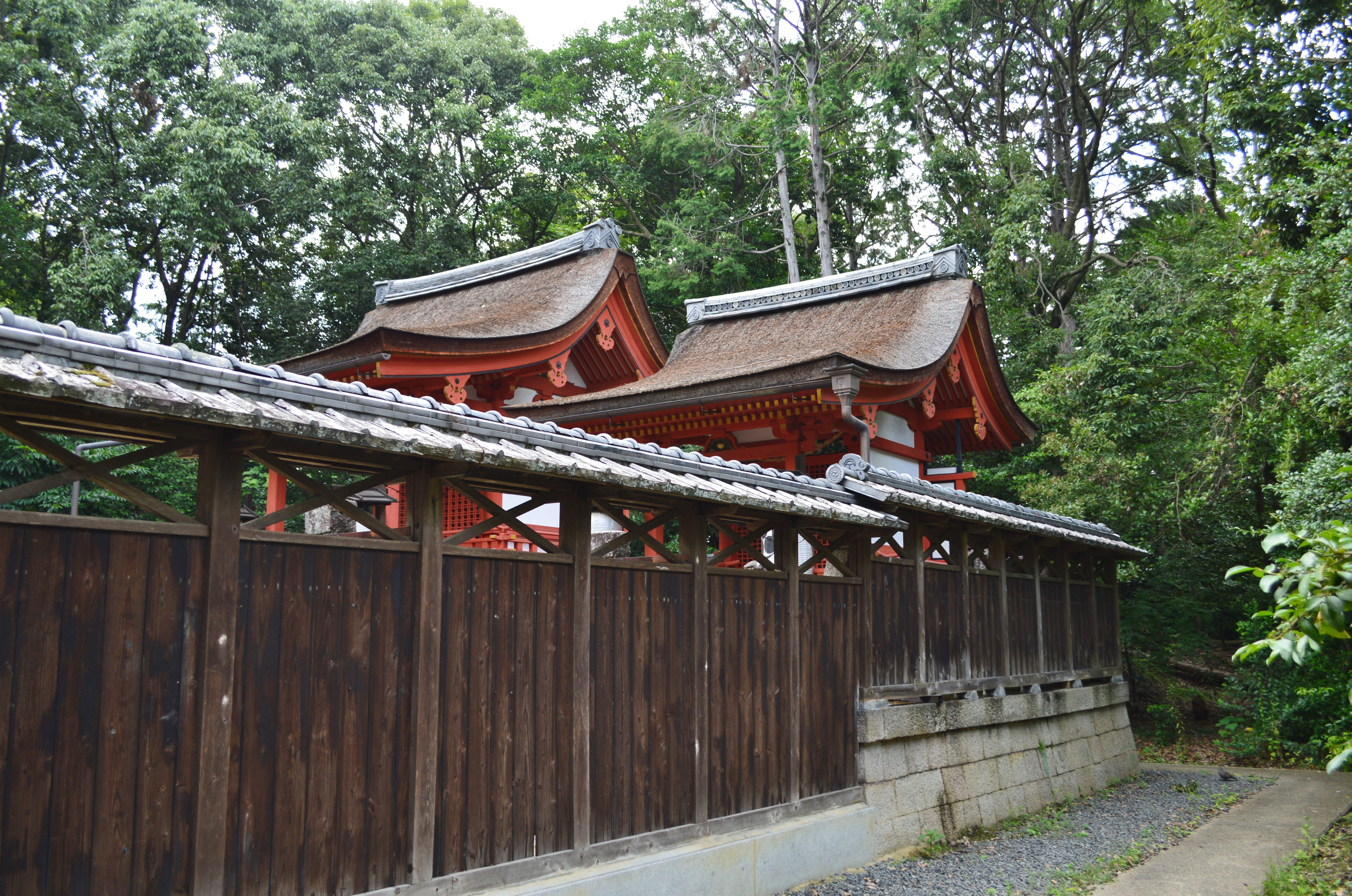 交野天神社 境内八幡神社